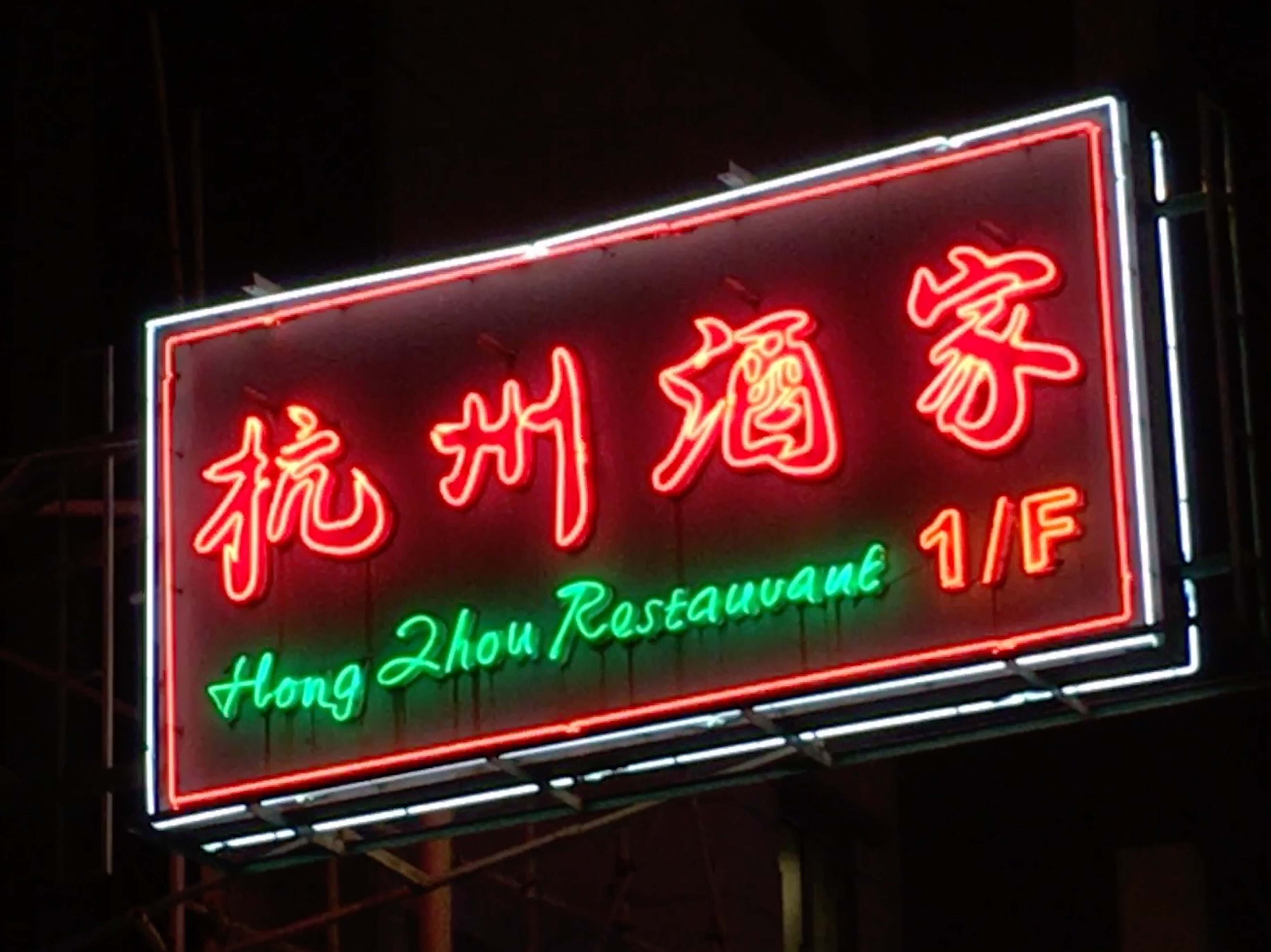 灣仔華懋莊士敦廣場1樓杭州酒家之霓虹燈招牌，中文書法由金庸先生題字